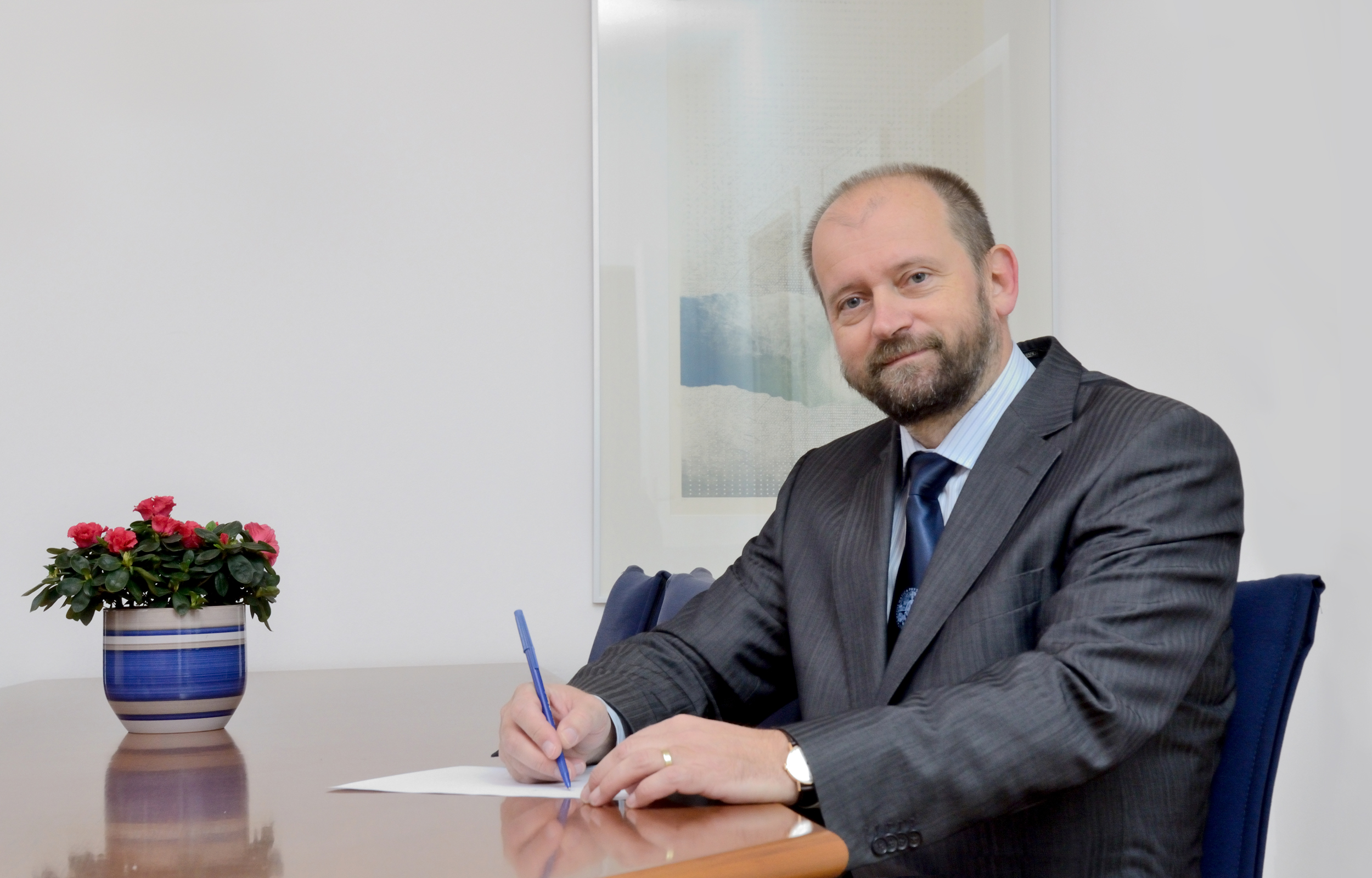 Prof. Kratochvíl